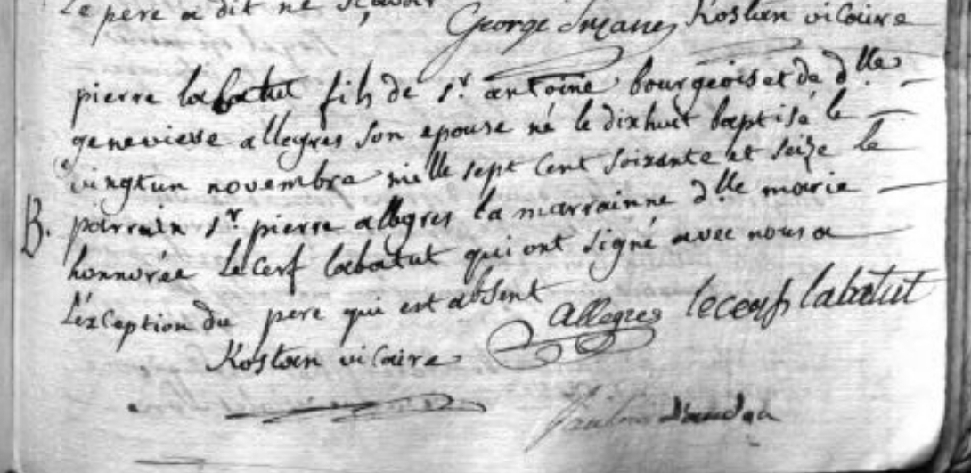 Il s'agit de l'acte de baptême du général Pierre Labatut, né à Cannes, devenu officier de la République de Carthagène-des-Indes puis de l'Armée impériale brésilienne.